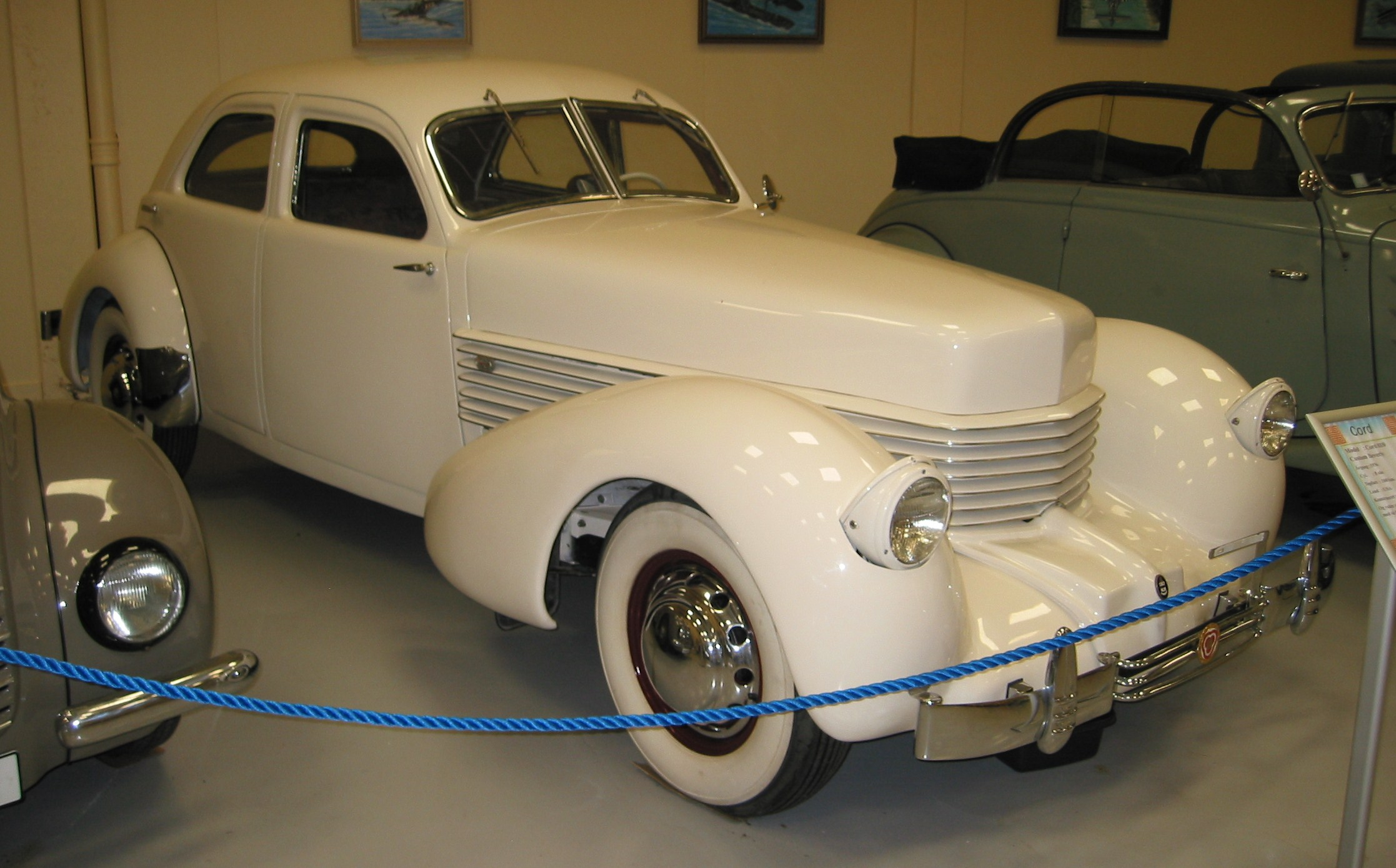 Cord 810 von 1936 im Vestsjællands Bilmuseum.